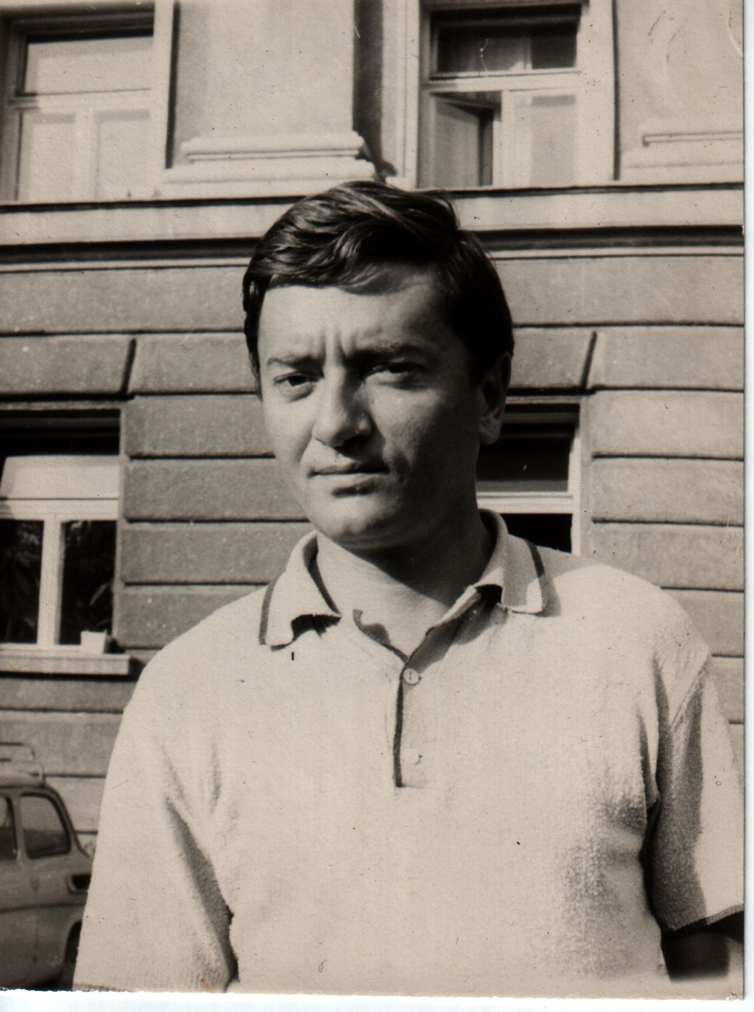 Миле Марковски български и македонски журналист, писател; Автор: неизвестен, 1975 г.; Фото: архив на писателя